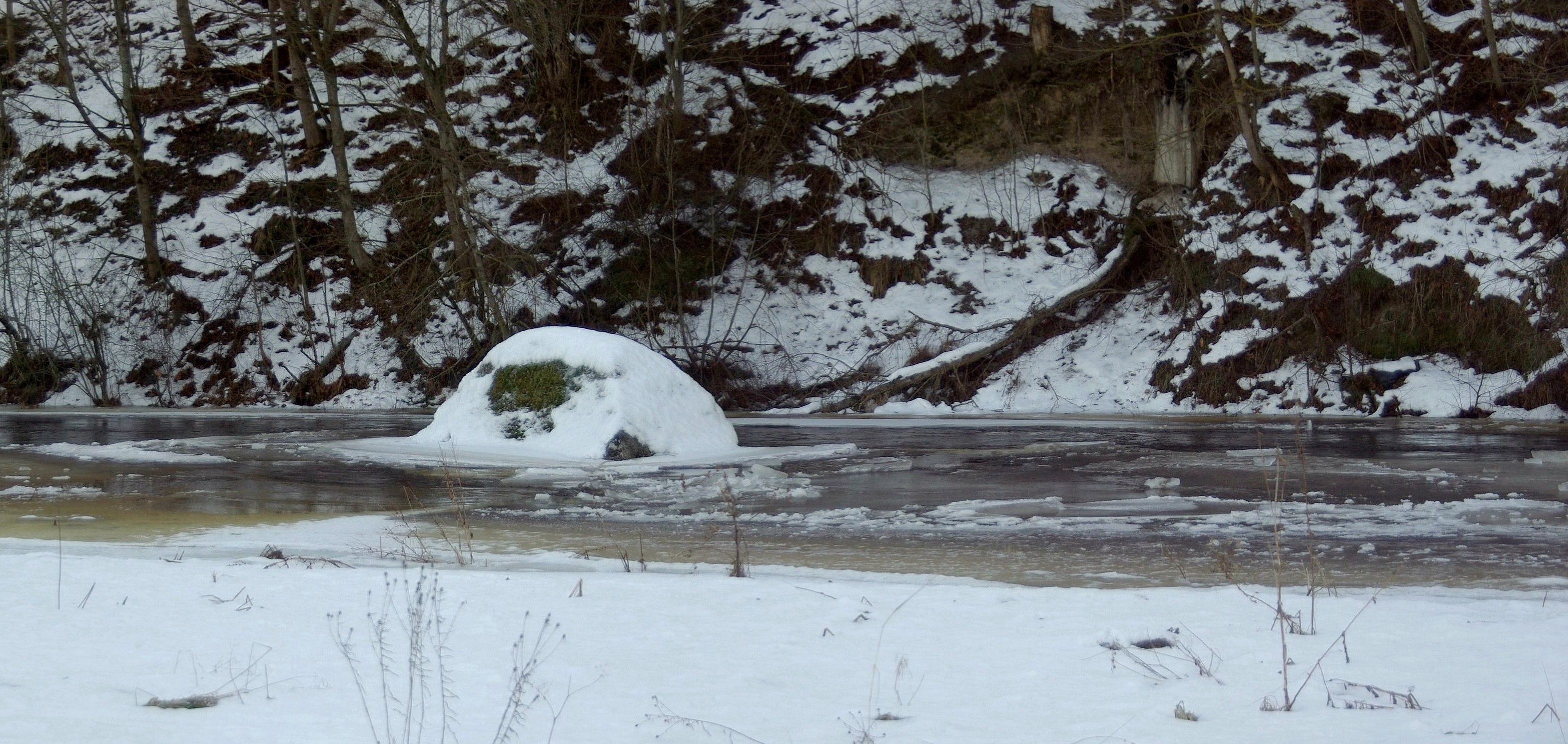 Asub Pirita jõe maastikukaitsealal Iru hooldekodu ligidal